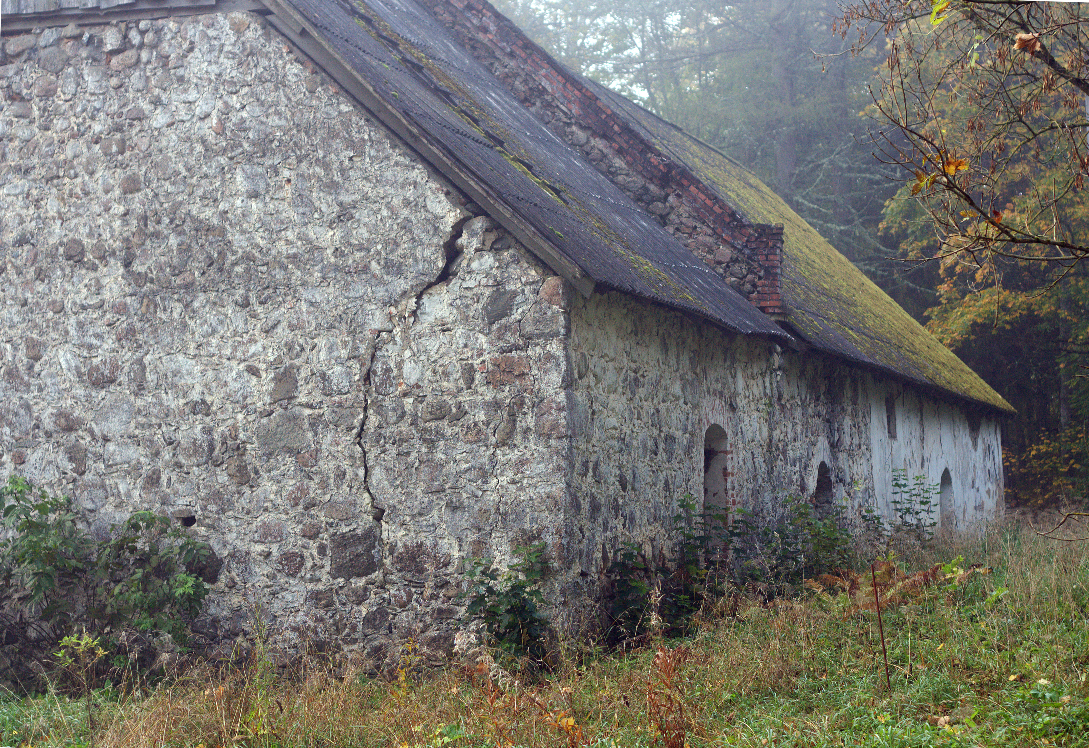 Joosu mõisa ait.